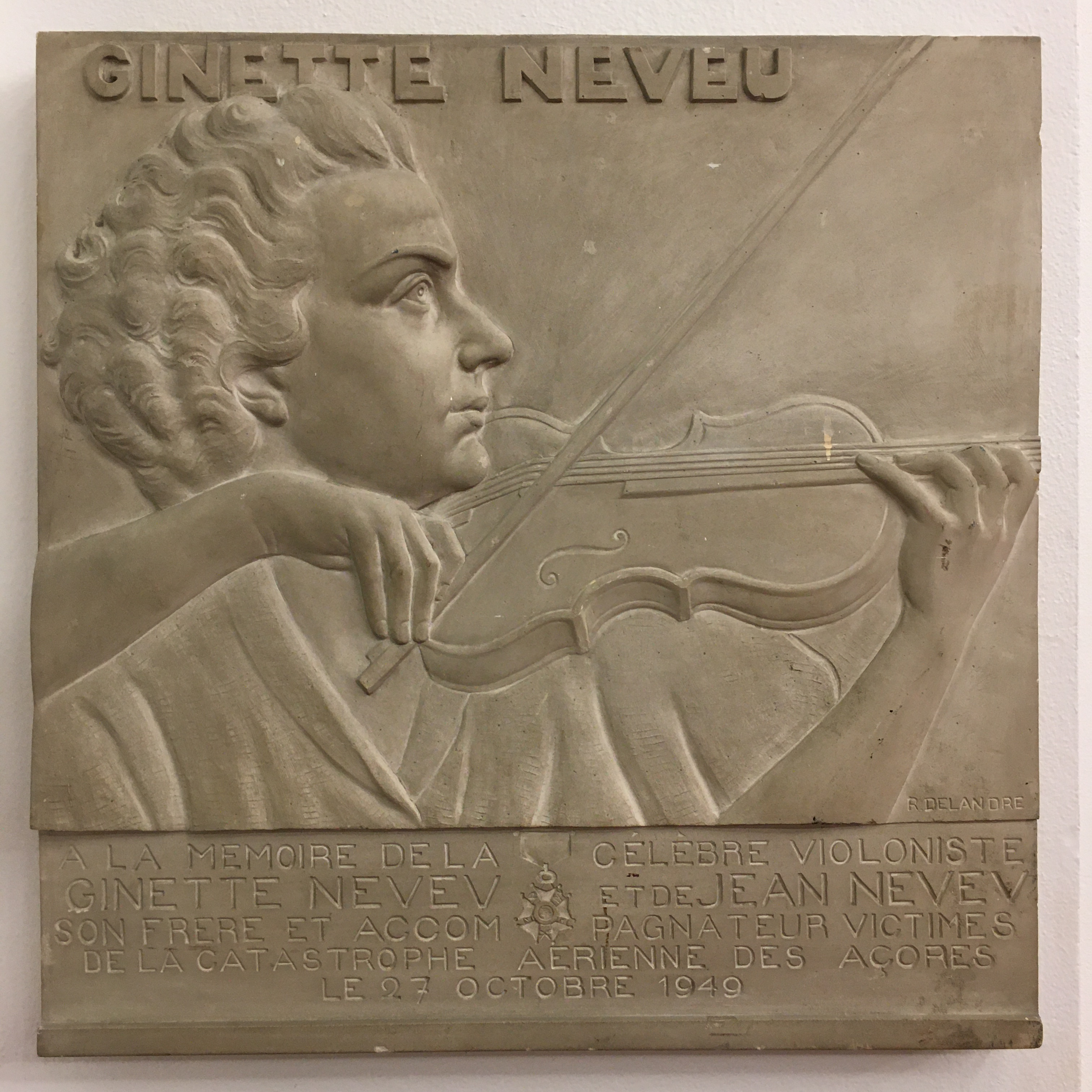 Paris salle Pleyel plaque à Ginette Neveu